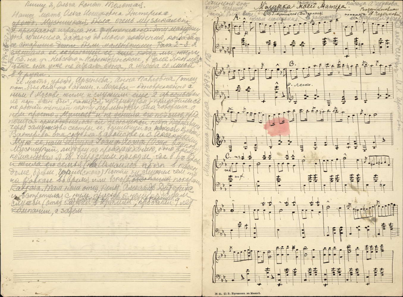 Дитерихс (рожд. Мусницкая) О. И. «Мазурка моей матери». Восстановлено по памяти А. К. Чертковой. Надписи рукой А. К. Чертковой и О. К. Толстой. Пояснения О. К. Толстой. Б. д.